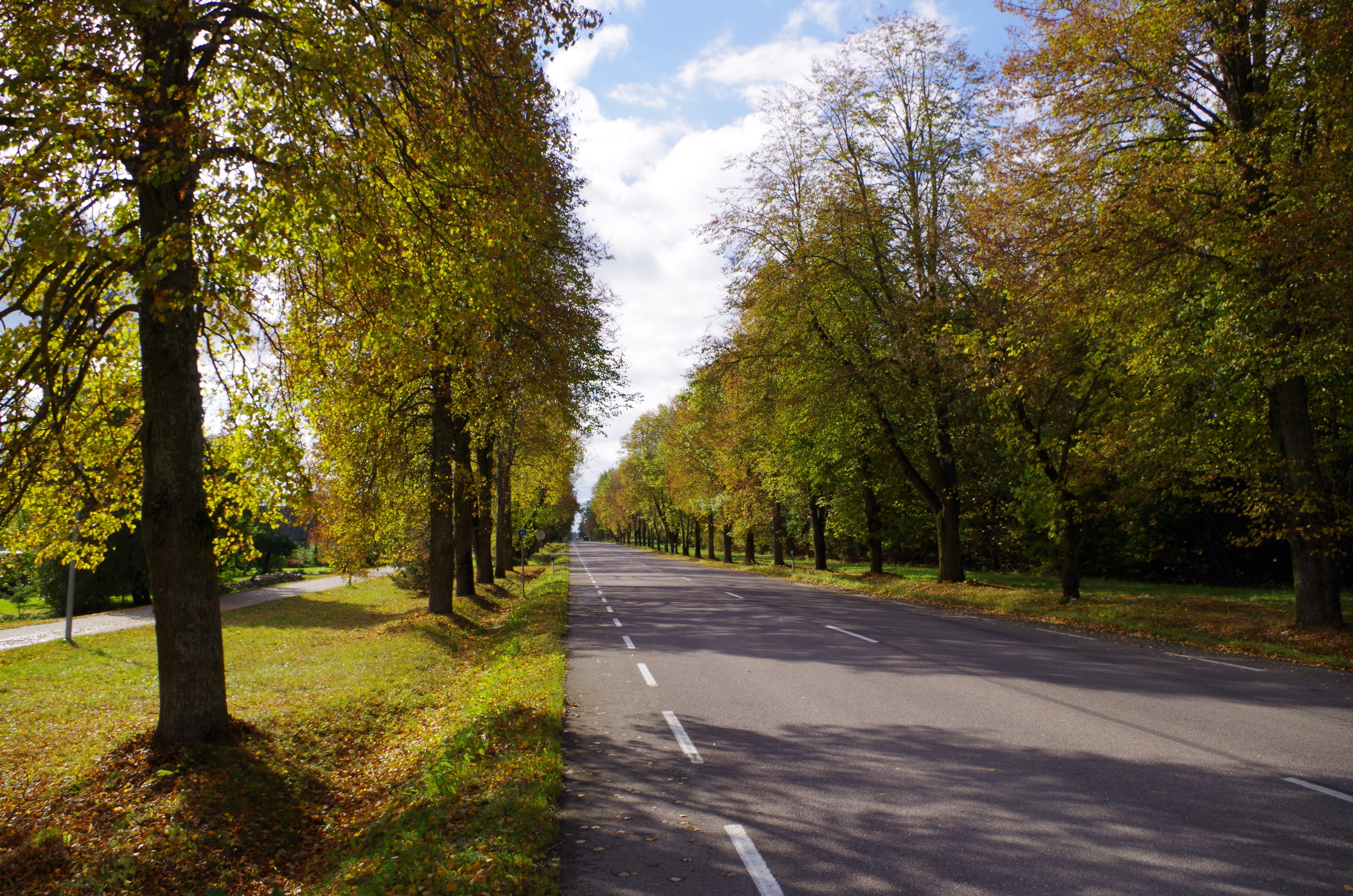 Vaade Tartu–Räpina maantee 61. kilomeetrilt Tartu suunas